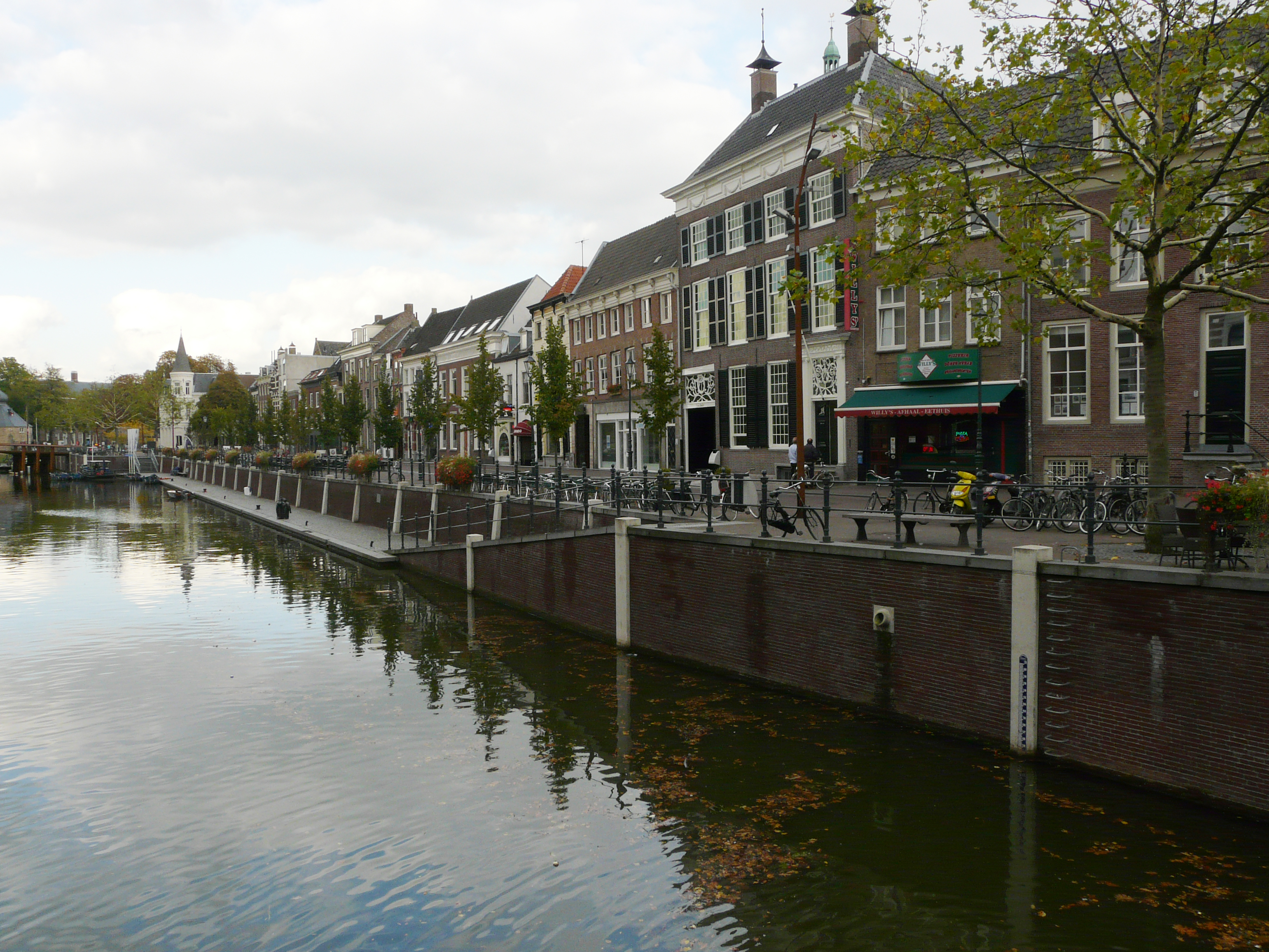 Zicht op een deel van de straat de Haven. Gelegen nabij de Haven van Breda